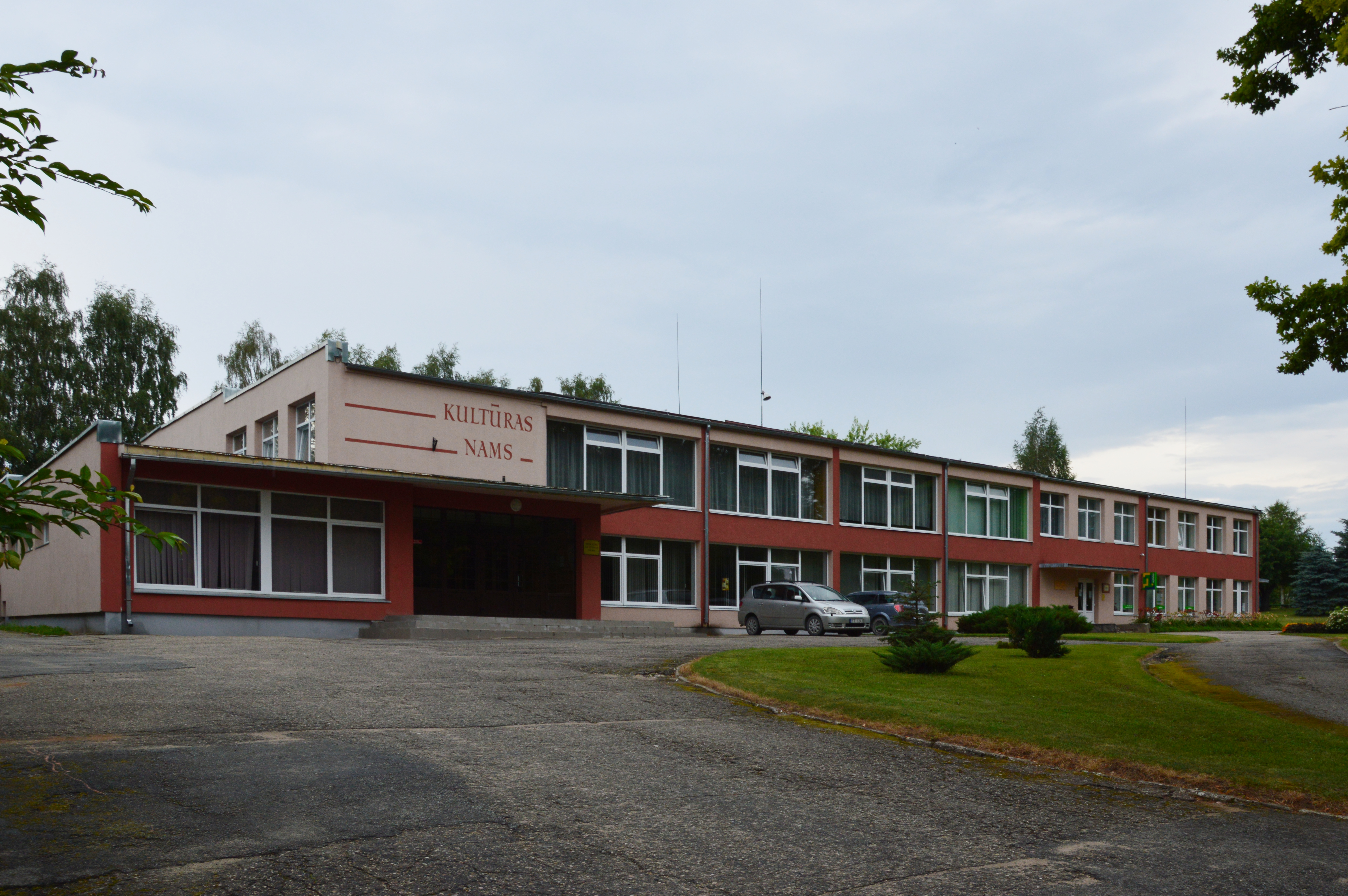 Trikāta kultuurimaja.